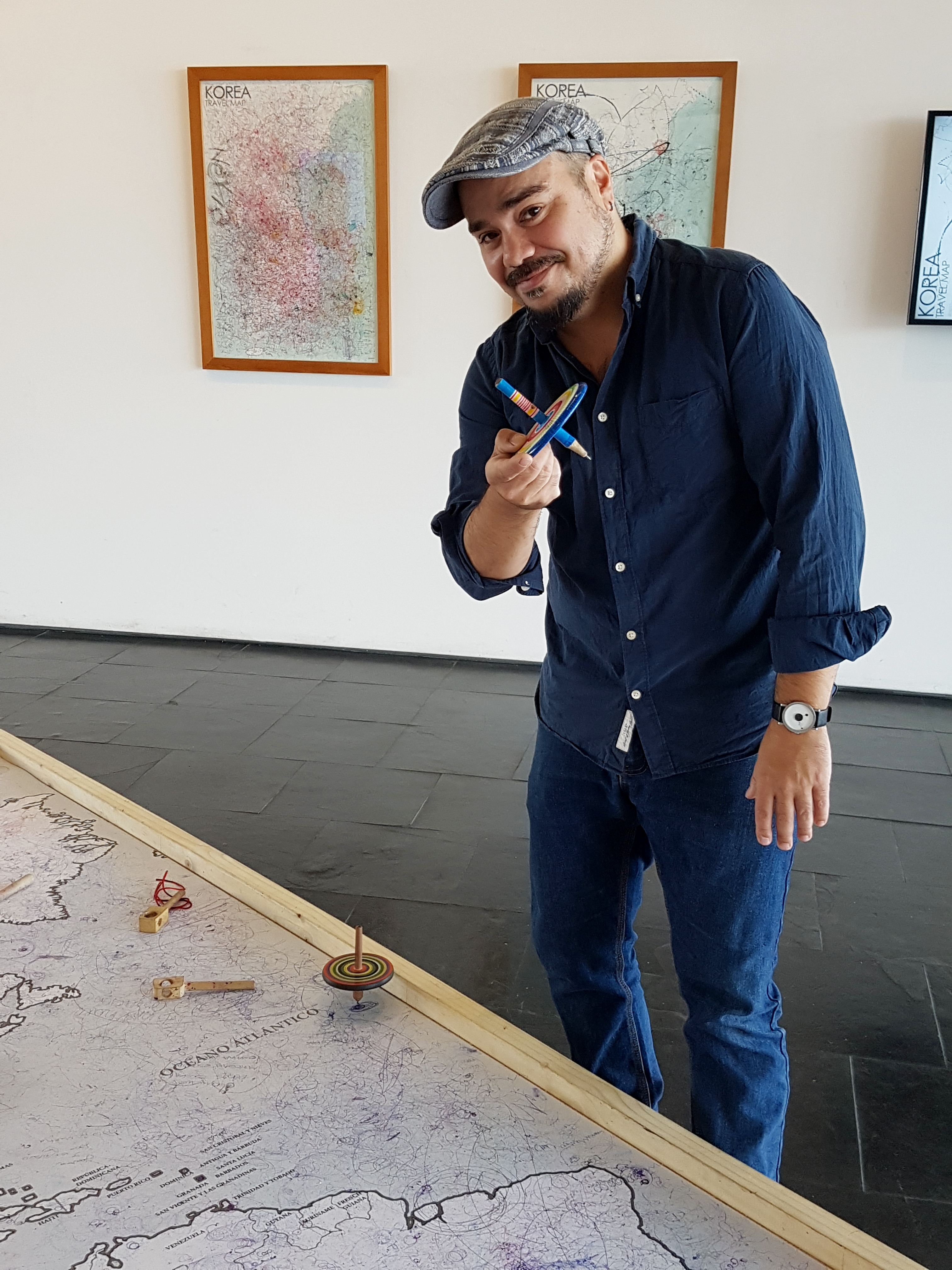 El artista visual chileno Máximo Corvalán-Pincheira en vísperas de la inauguración de su exposición Trazo mutable en el Centro Nacional de Arte Contemporáneo Cerrillos, Santiago de Chile.